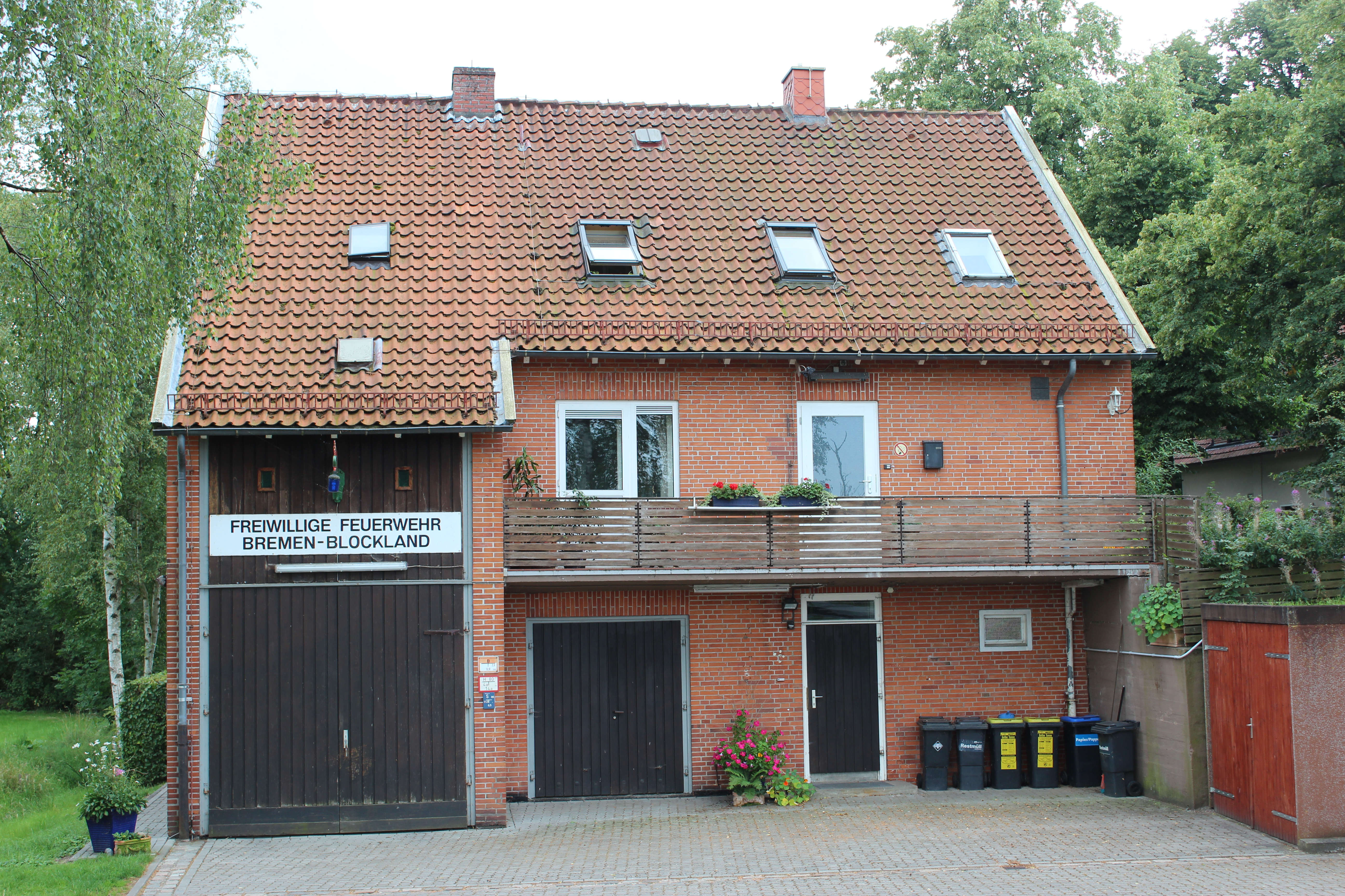 Freiwillige Feuerwehr Bremen-Blockland